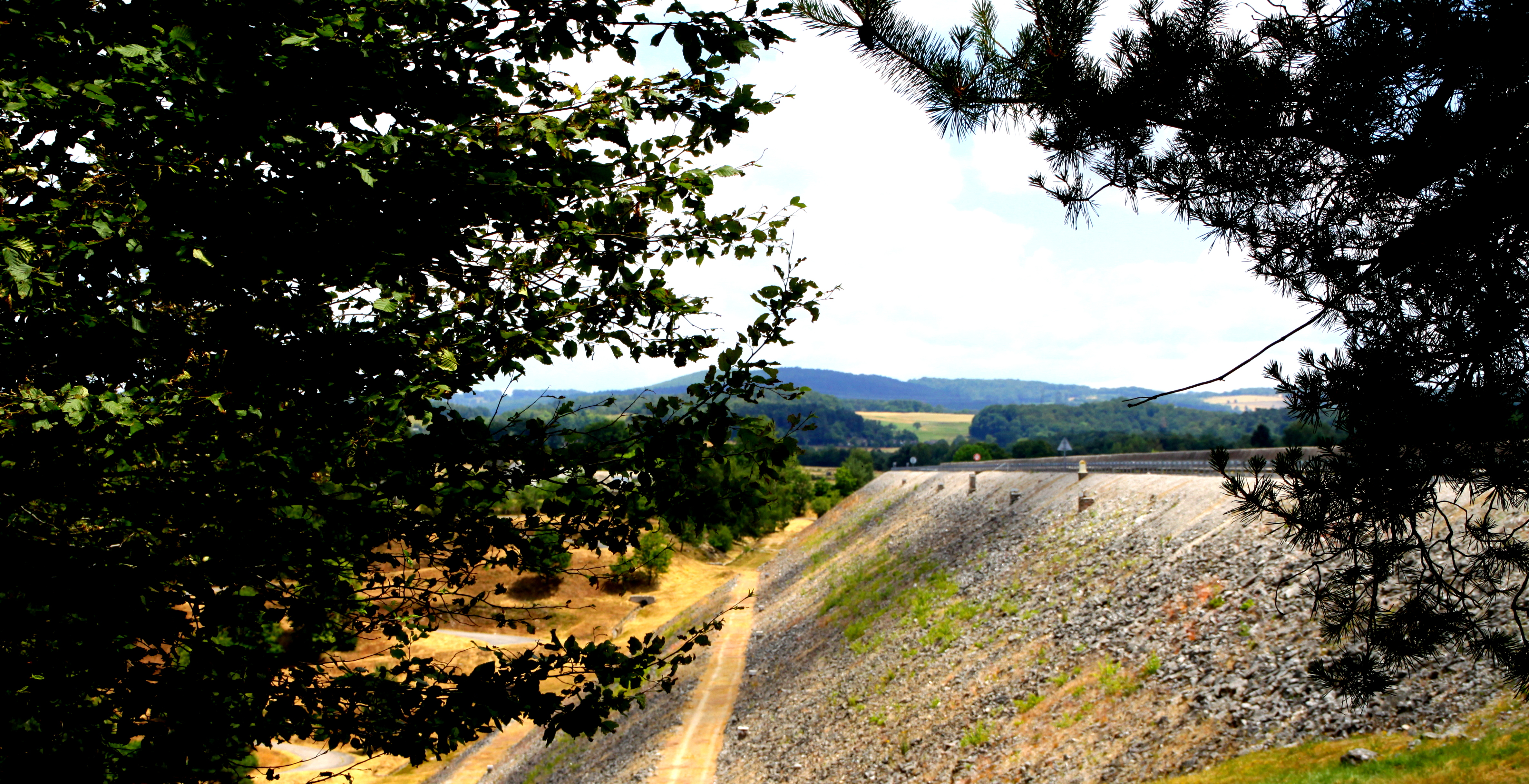 D'Staumauer vu Monnès no ënne gesinn